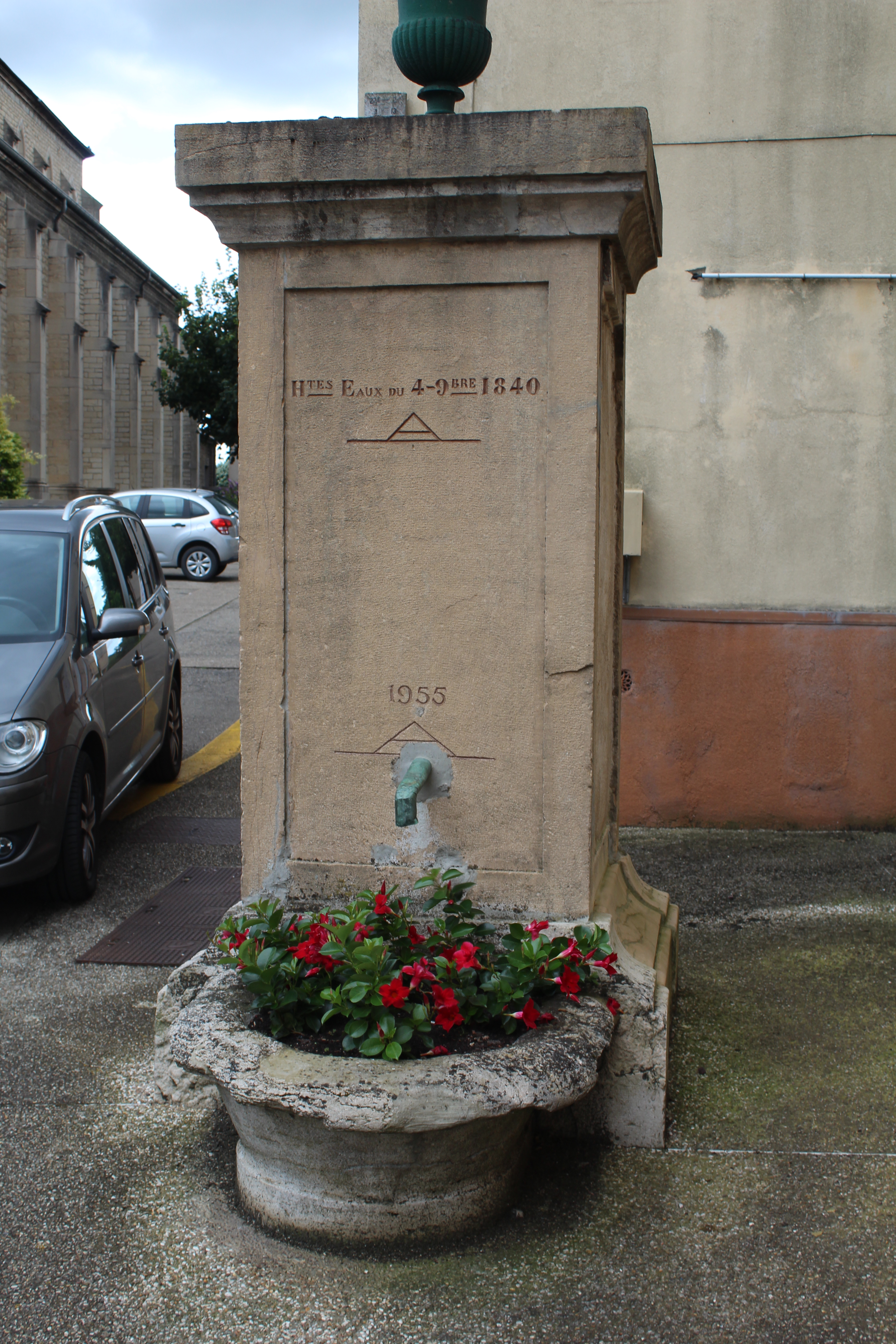 Pompe à eau à Saint-Laurent-sur-Saône sur la place de l'Église.